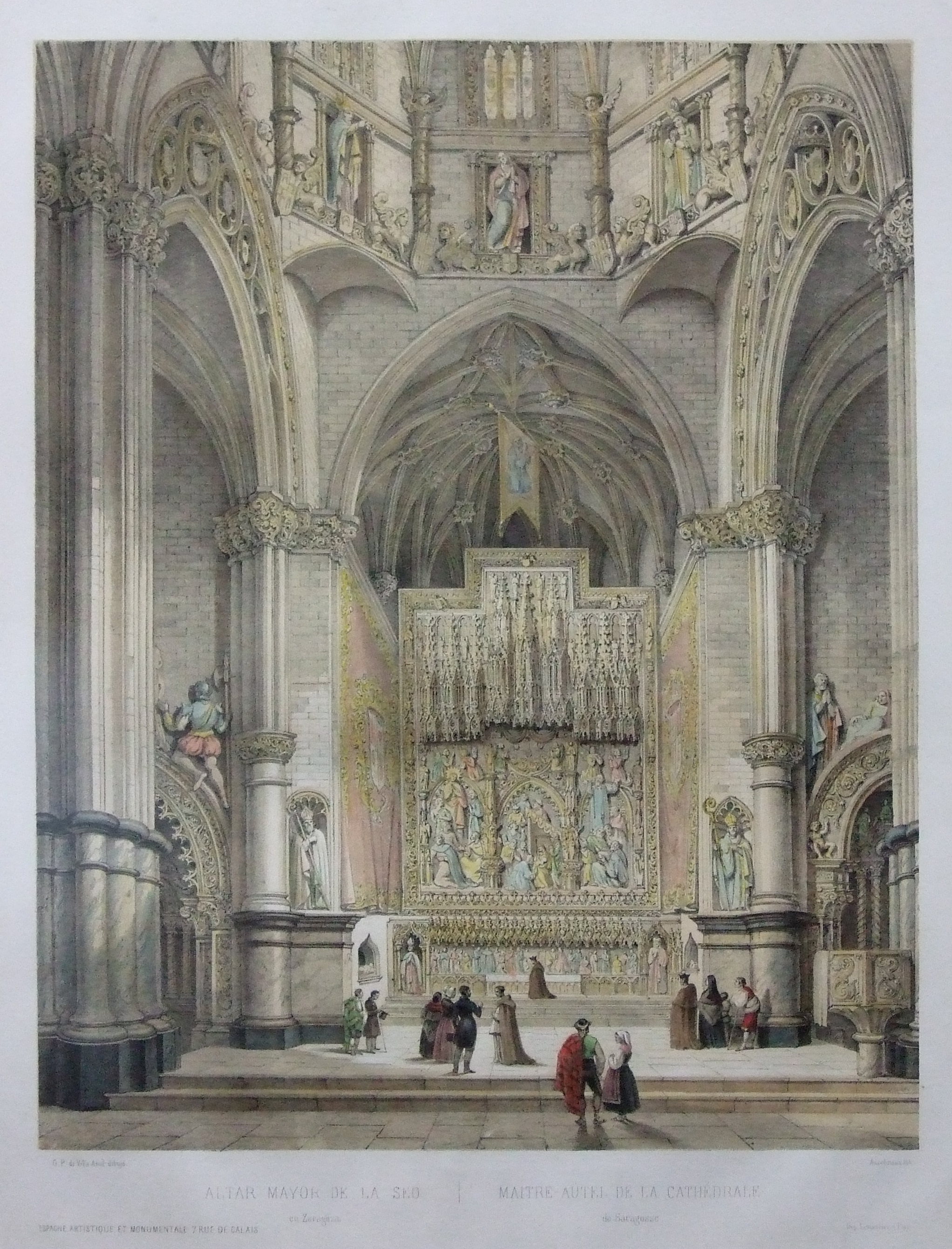 Capilla mayor de la catedral de El Salvador (1842) Autores Jenaro Pérez Villaamil (dib.) y Alfred Guesdon (lit.) Archivo Municipal, Zaragoza